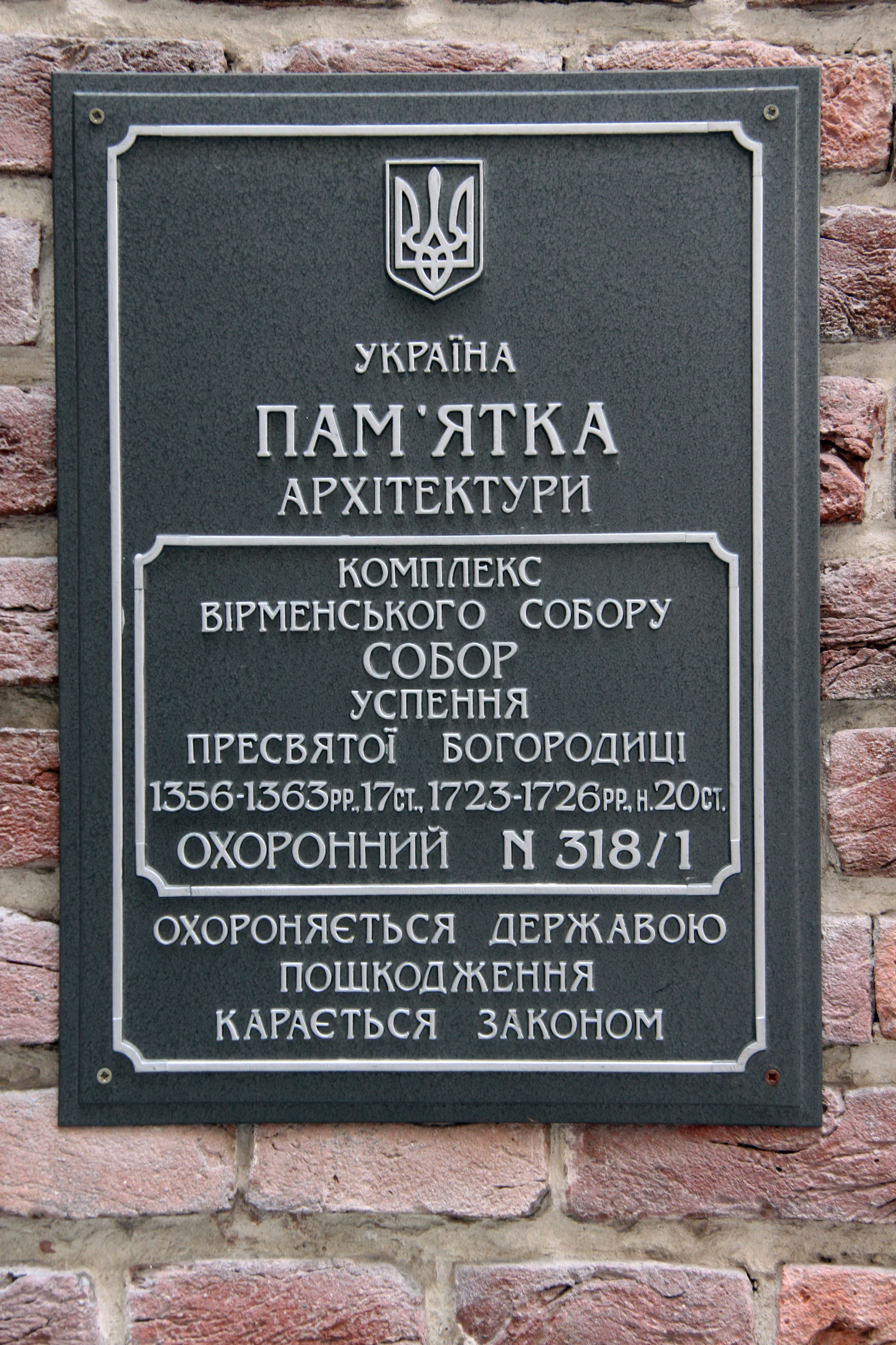 Вірменський собор св. Трійці, Вірменська, 7, Львів